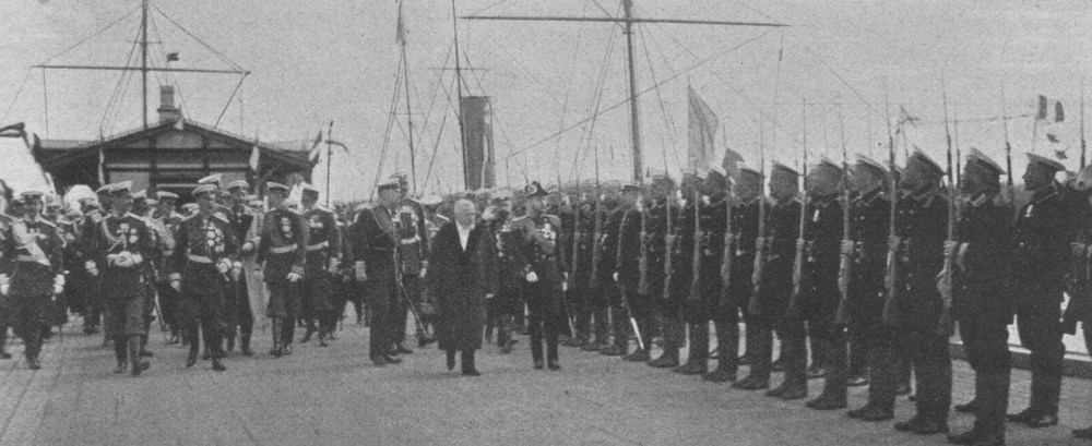 Der französische Präsident Émile Loubet (1838-1929) und Zar Nikolaus II. von Rußland (1868-1918) nehmen eine Parade in Kronstadt ab.